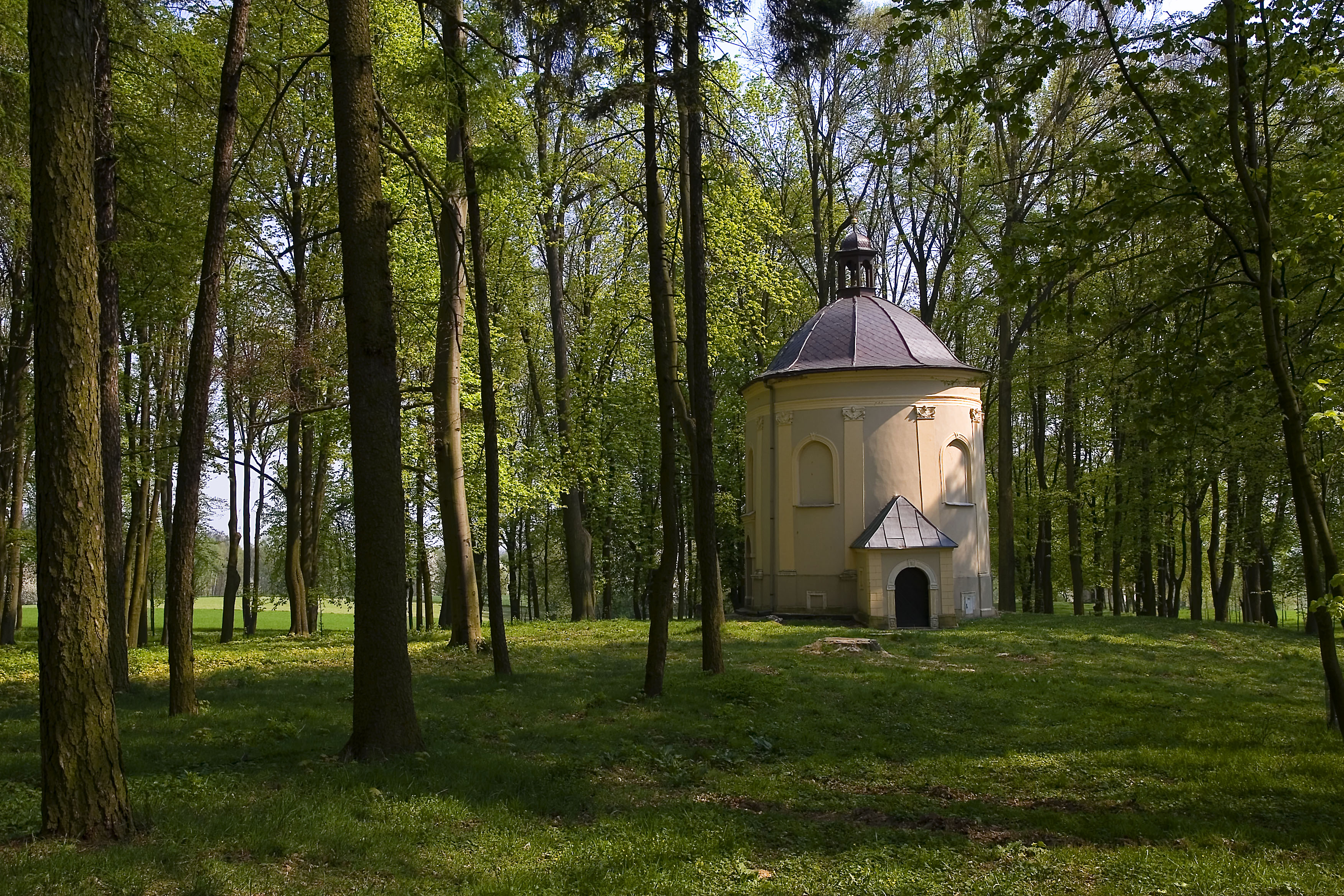 Góra św. Anny, kaplica Dom Kaifasza, Gmina Leśnica, powiat strzelecki